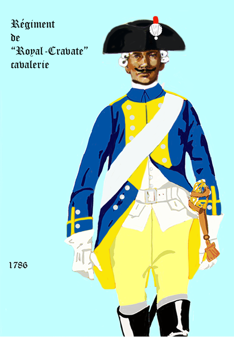 L' uniforme du régiment "Royal-Cravate cavalerie" de 1786 à 1791